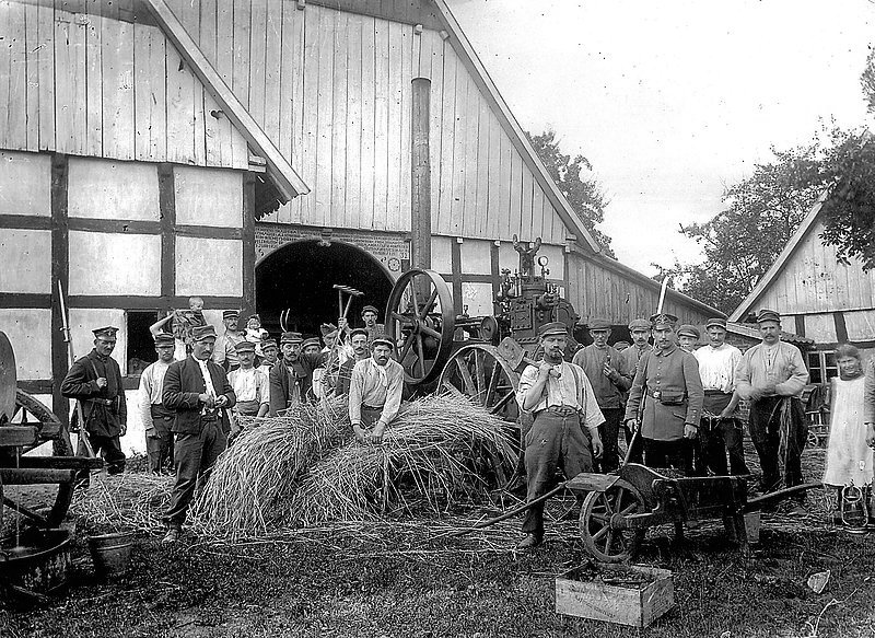 Französische Kriegsgefangene bei der Arbeit in Westscheid bei Mennighüffen (Hof Sundermeier)